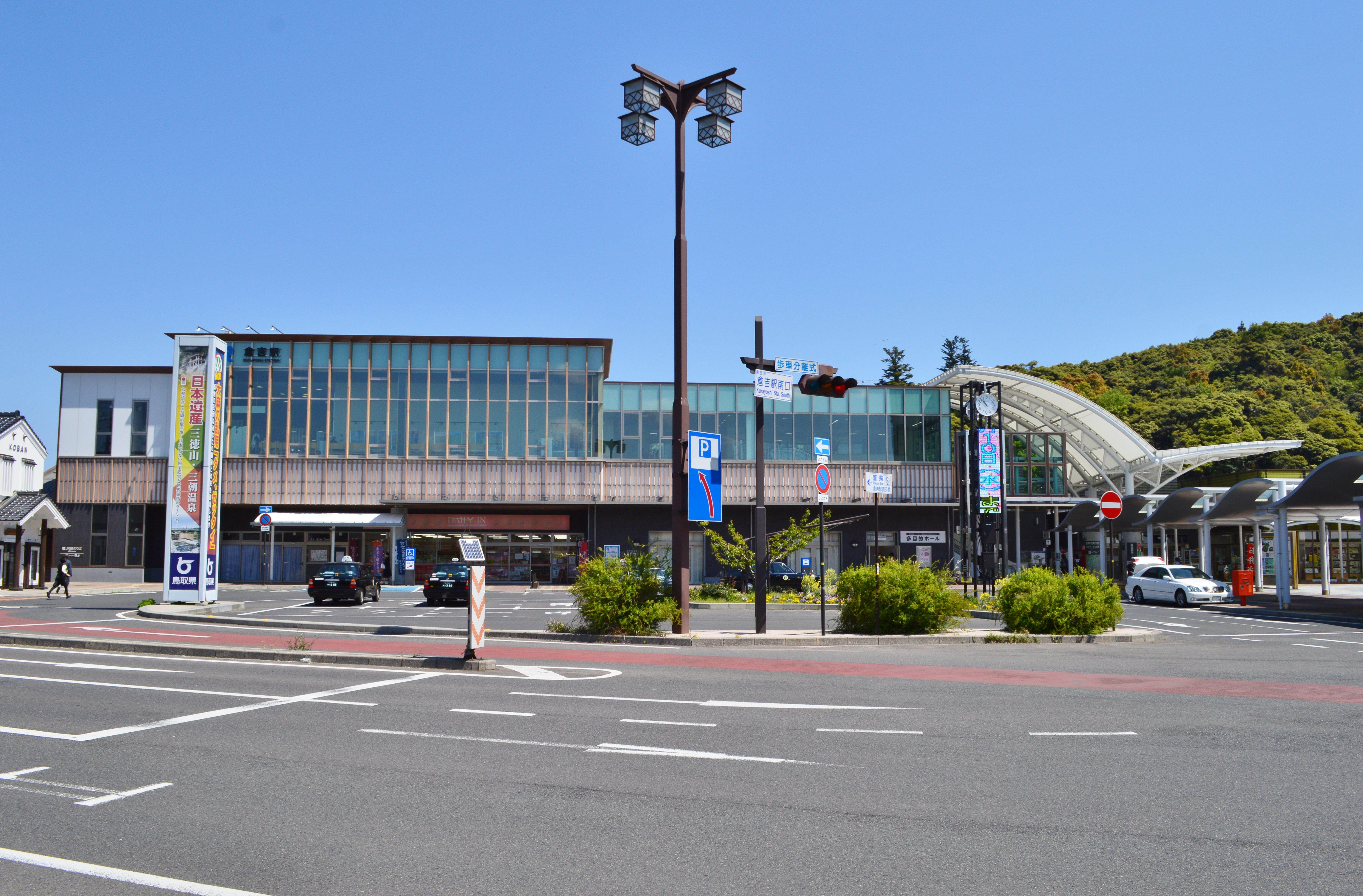 倉吉駅 駅舎